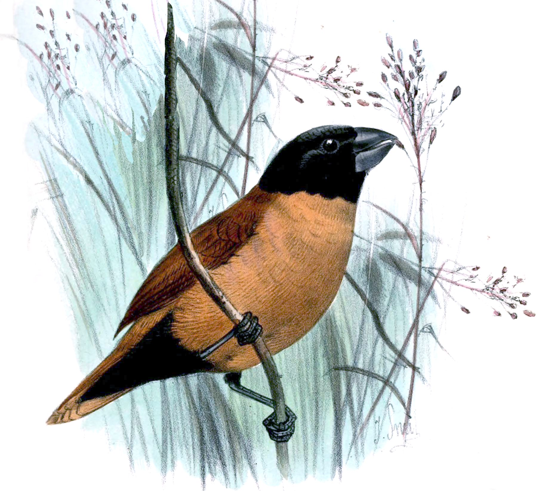 Munia forbesi